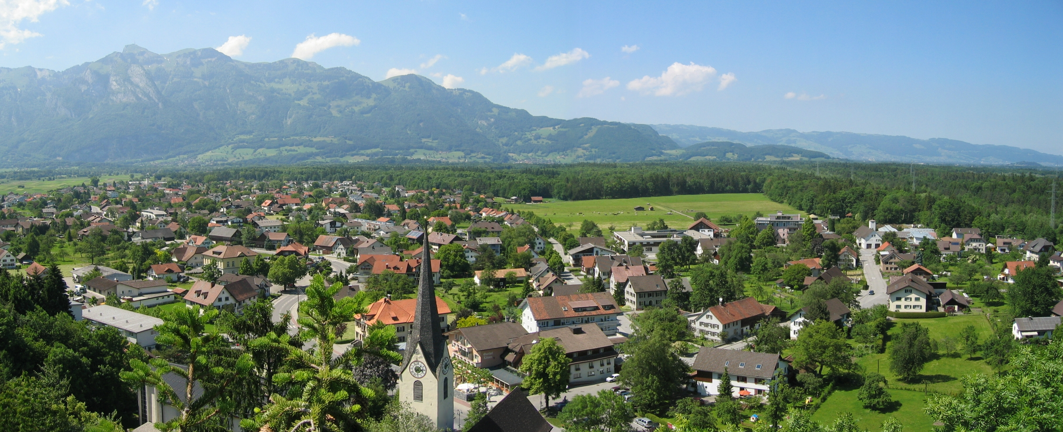 Vorarlberg, Feldkirch, Nofels, Panorama, gegen Schweizer Berge, Hoher Kasten